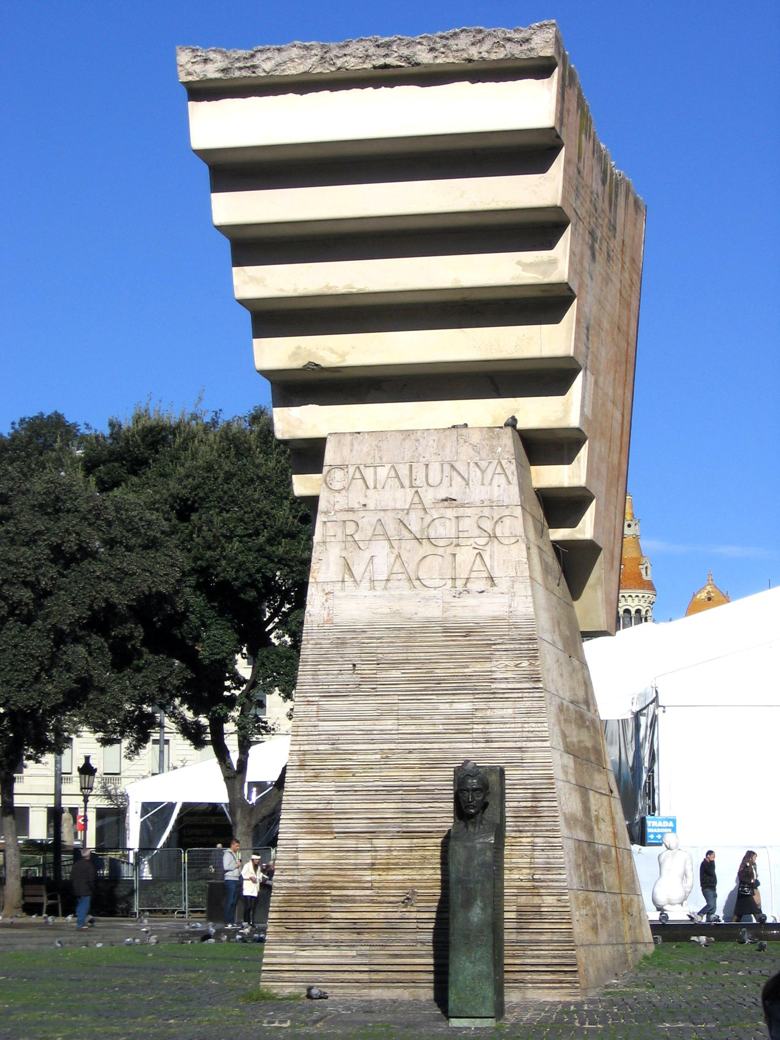 Monumento a Francesc Macià, de Josep Maria Subirachs, Plaza Cataluña, Barcelona.